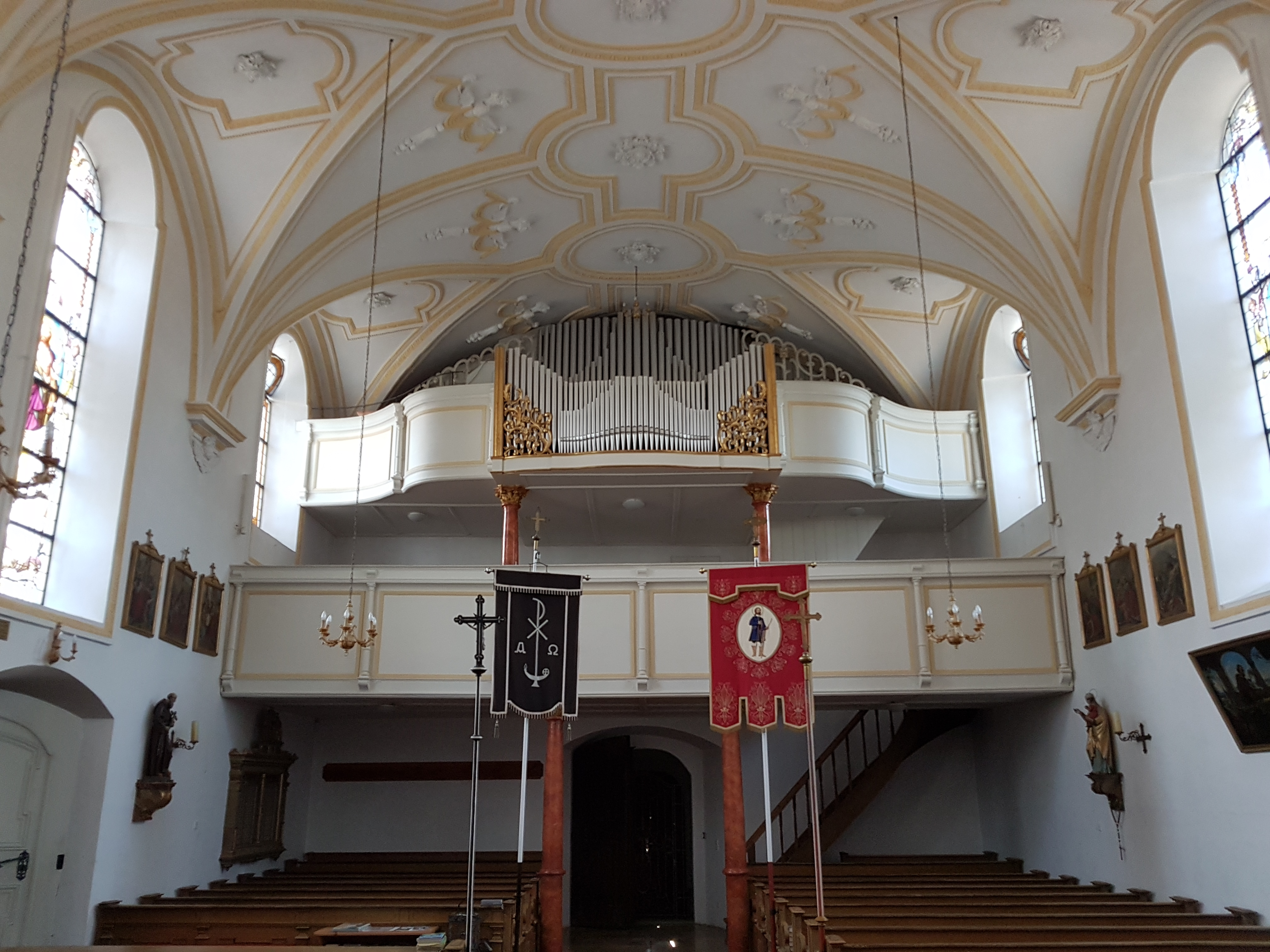 Antdorf, St. Peter und Paul